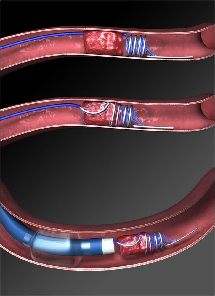 وسیلهای که با آن لختههای خون را در رگ از بین میبرند.